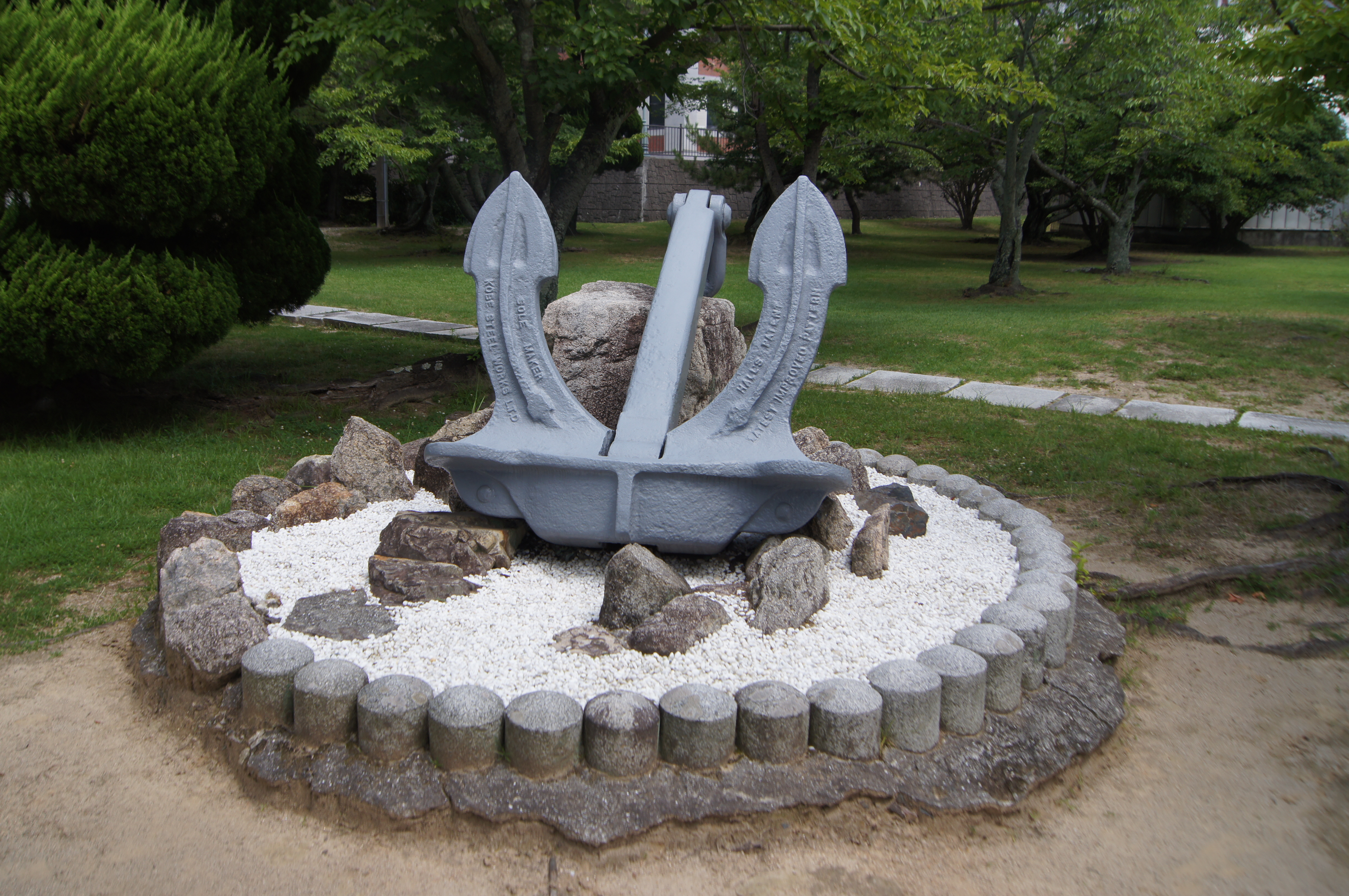 雪風の錨。江田島の旧海軍兵学校にて撮影